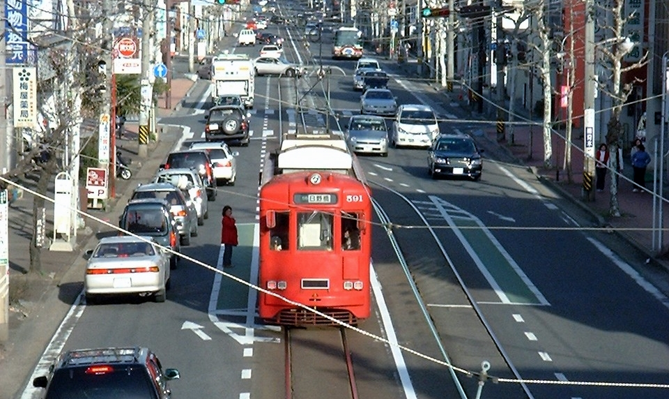 梅林電停に停車中の590形